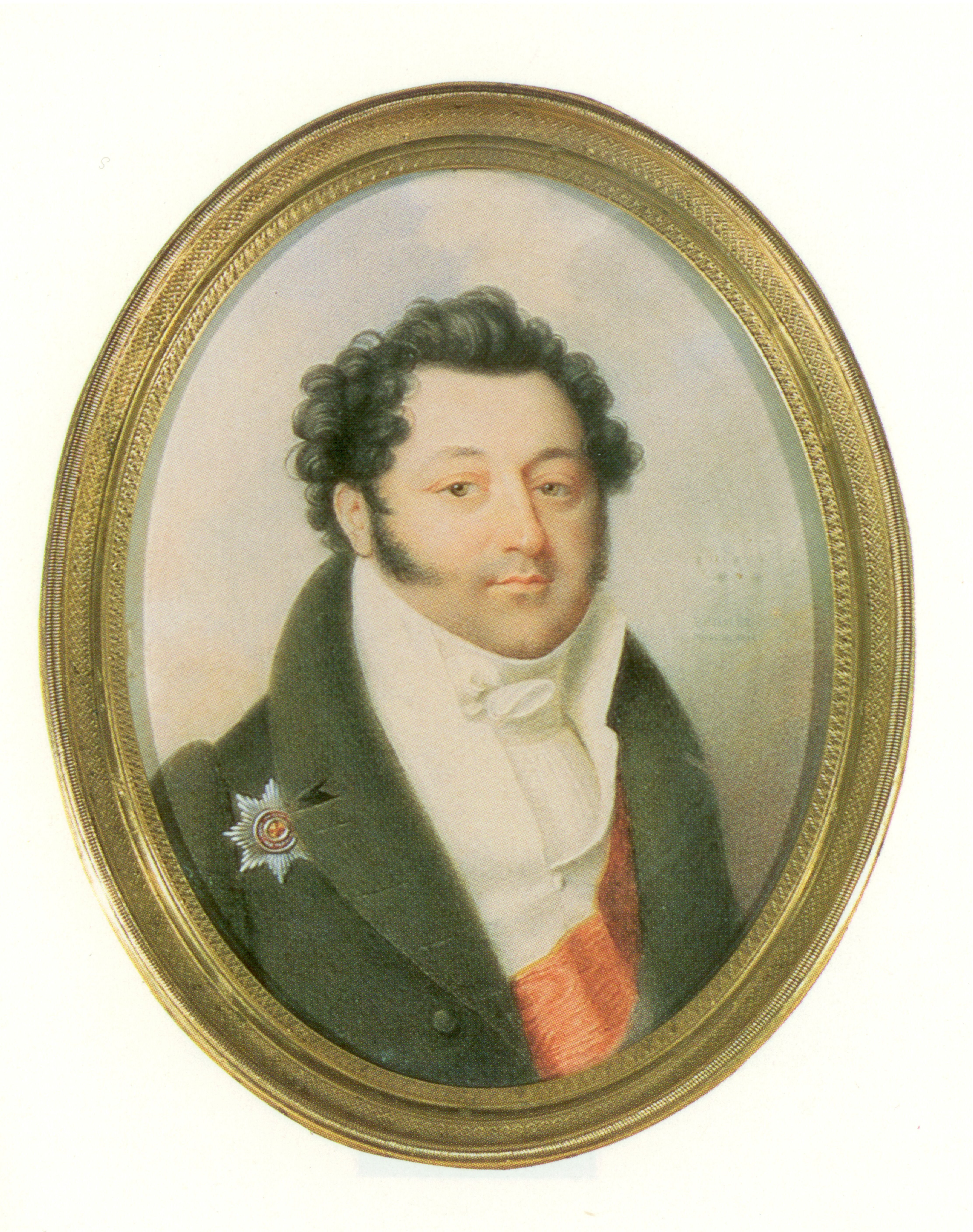 Константин Яковлевич Булгаков (1782-1835)